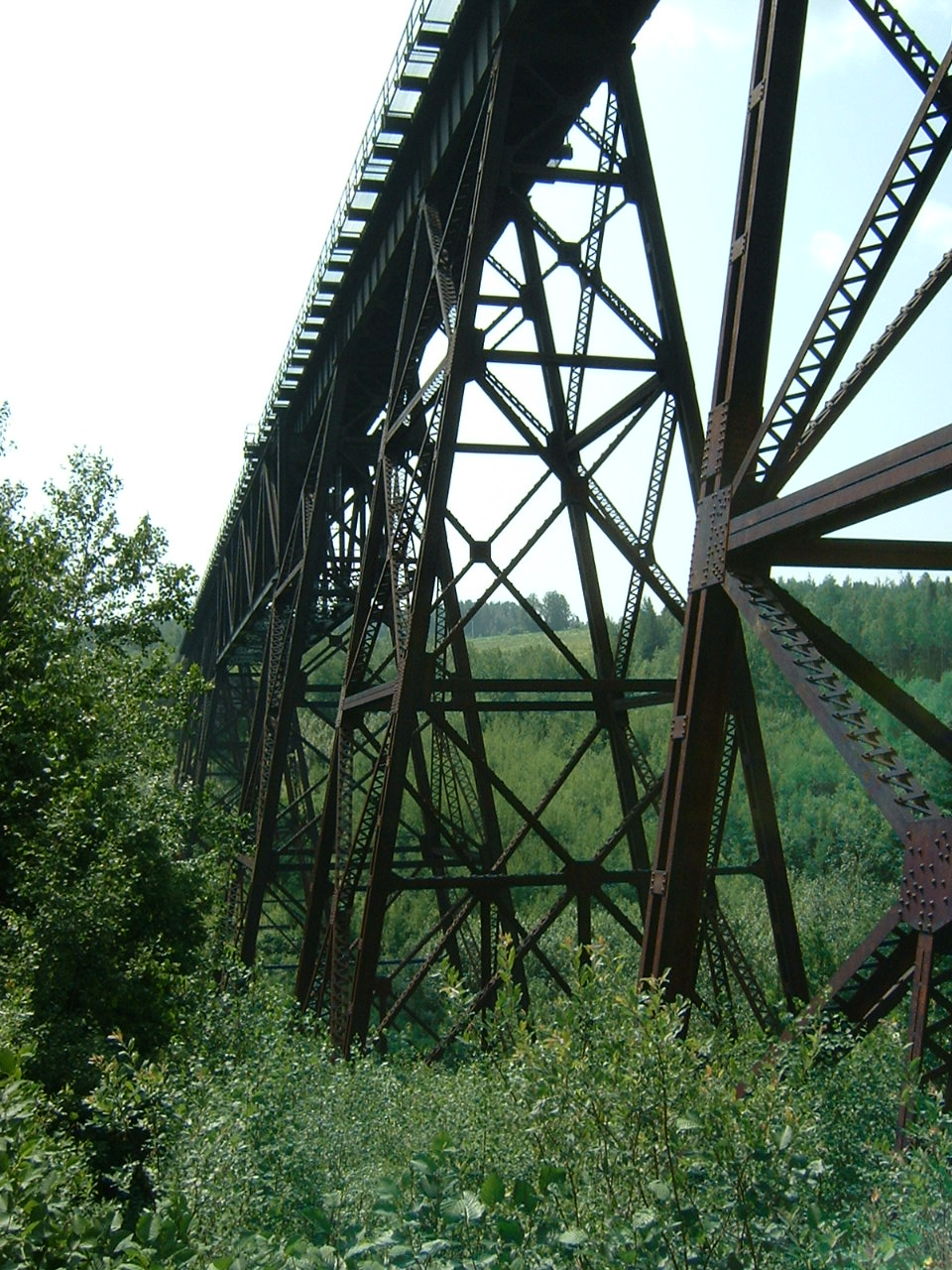 Pont ferroviaire sur la ligne du Transcontinental, à Pohénégamook, au Témiscouata, Québec, Canada